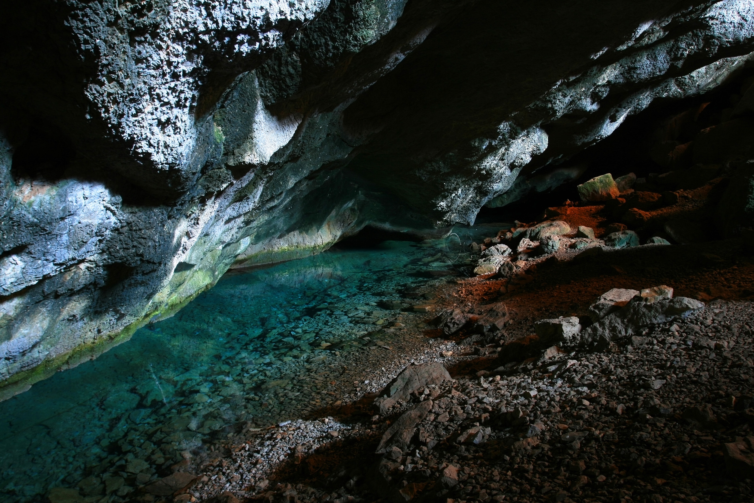 Σπήλαιο Φράγχθι«Σπήλαιο Φράγχθι»